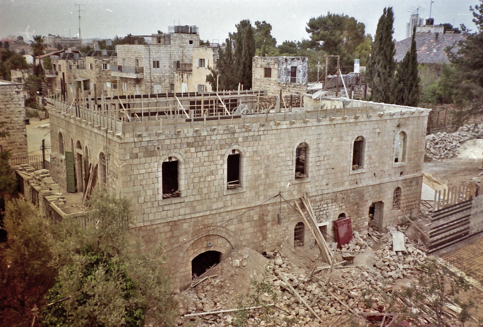 פנים he:בית פין